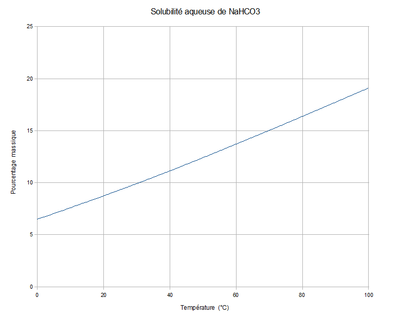 Solubilité aqueuse du bicarbonate de soude